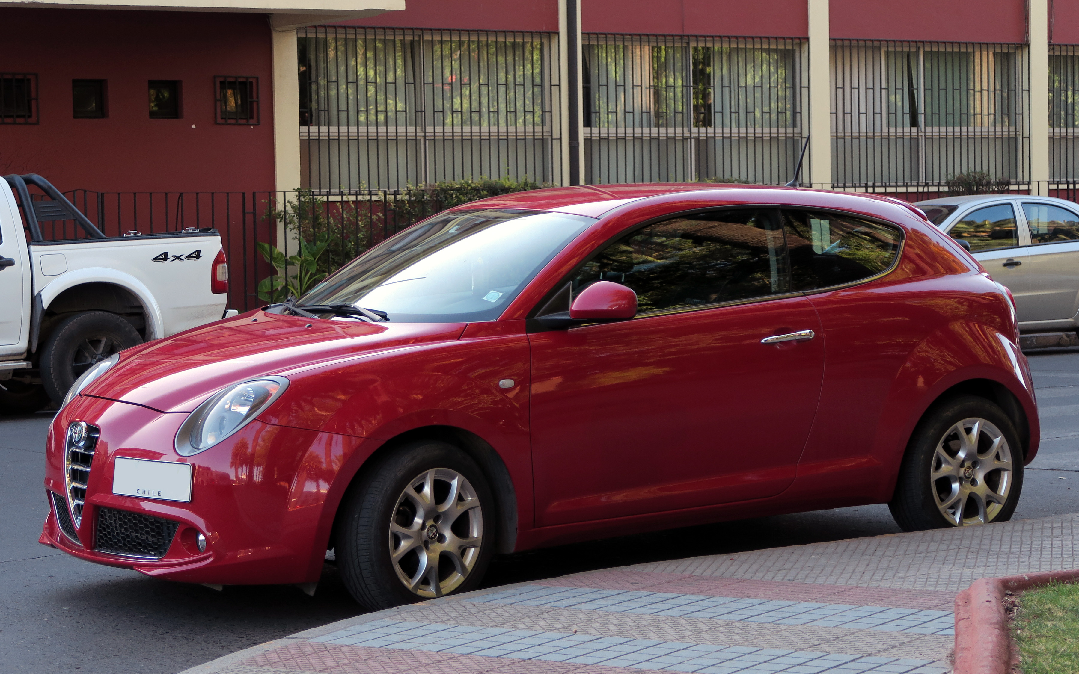 Alfa Romeo MiTo 1.4T 2014